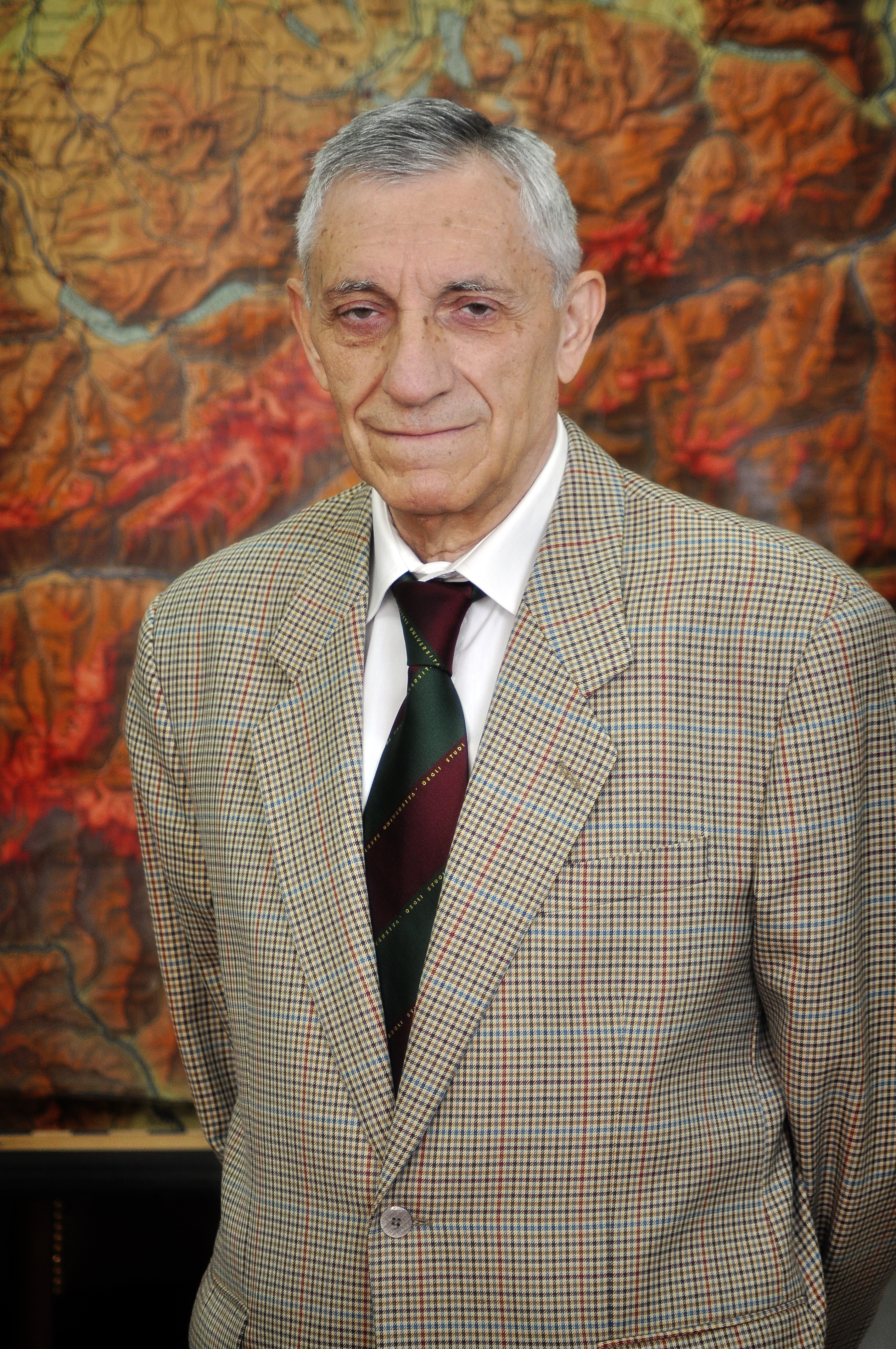 Dr Stevan Stanković